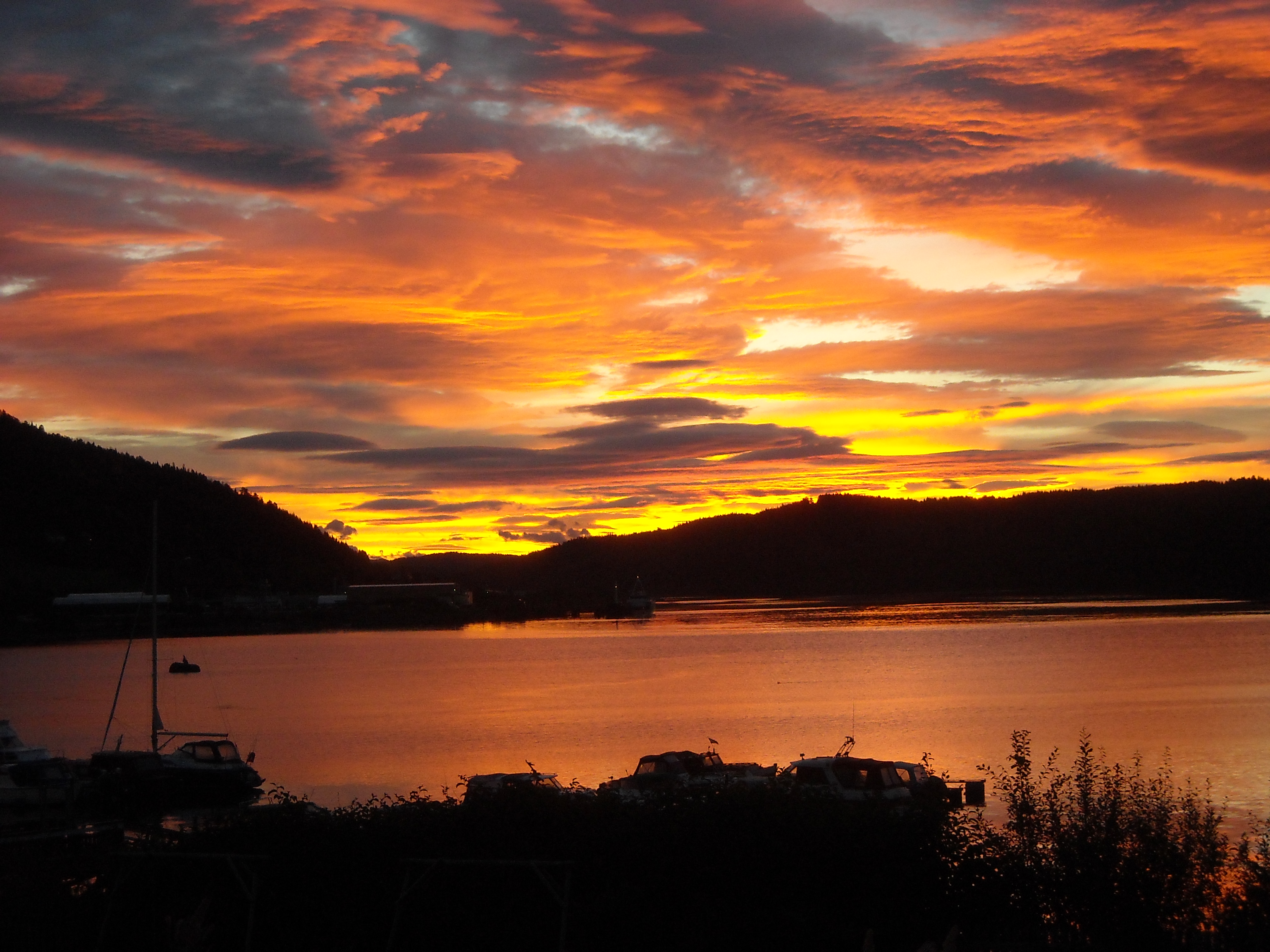 foto over Tjuin og småbåthavna, Malm